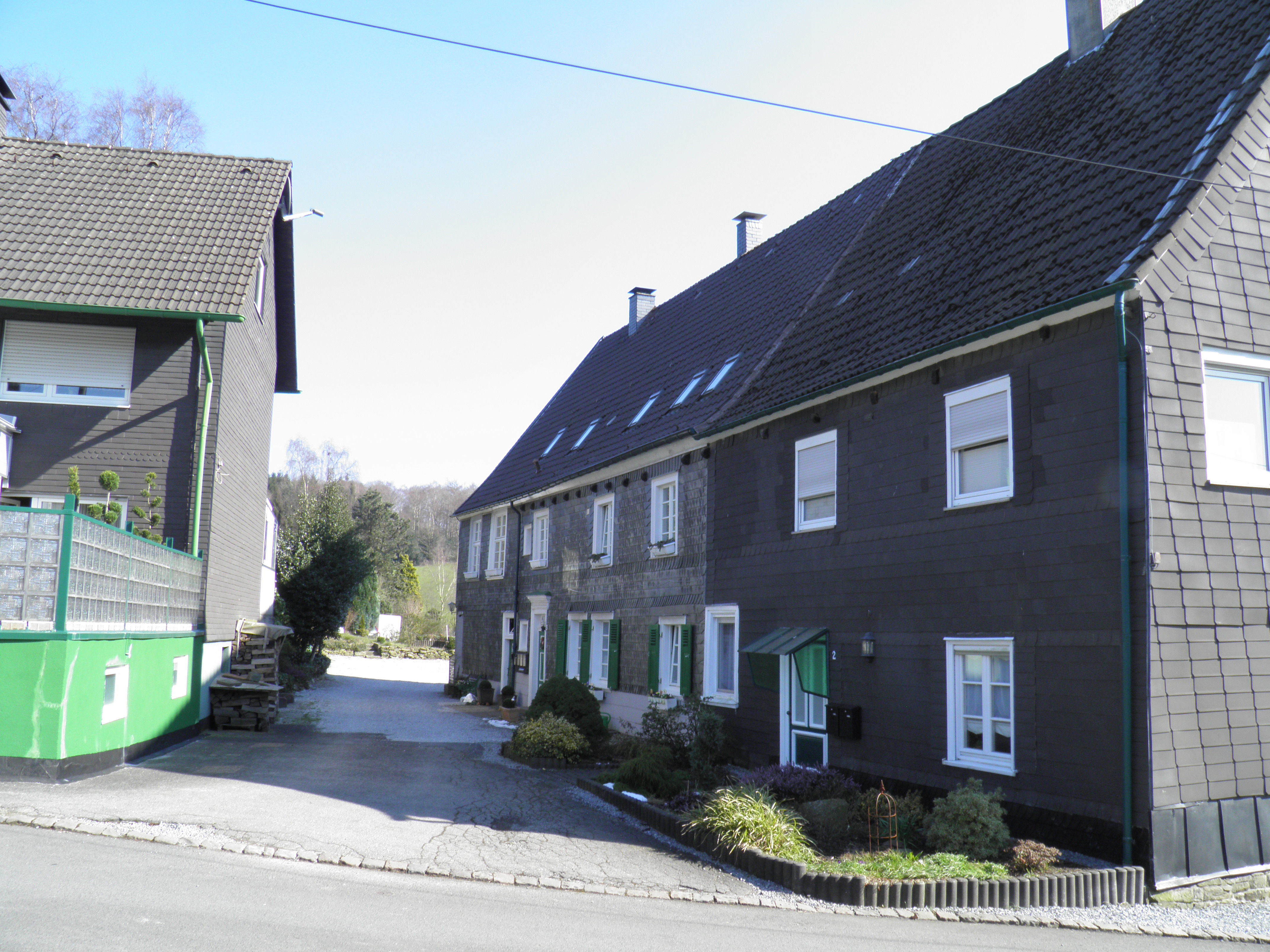 Zwei Gebäude unter Denkmalschutz in Oelingrath